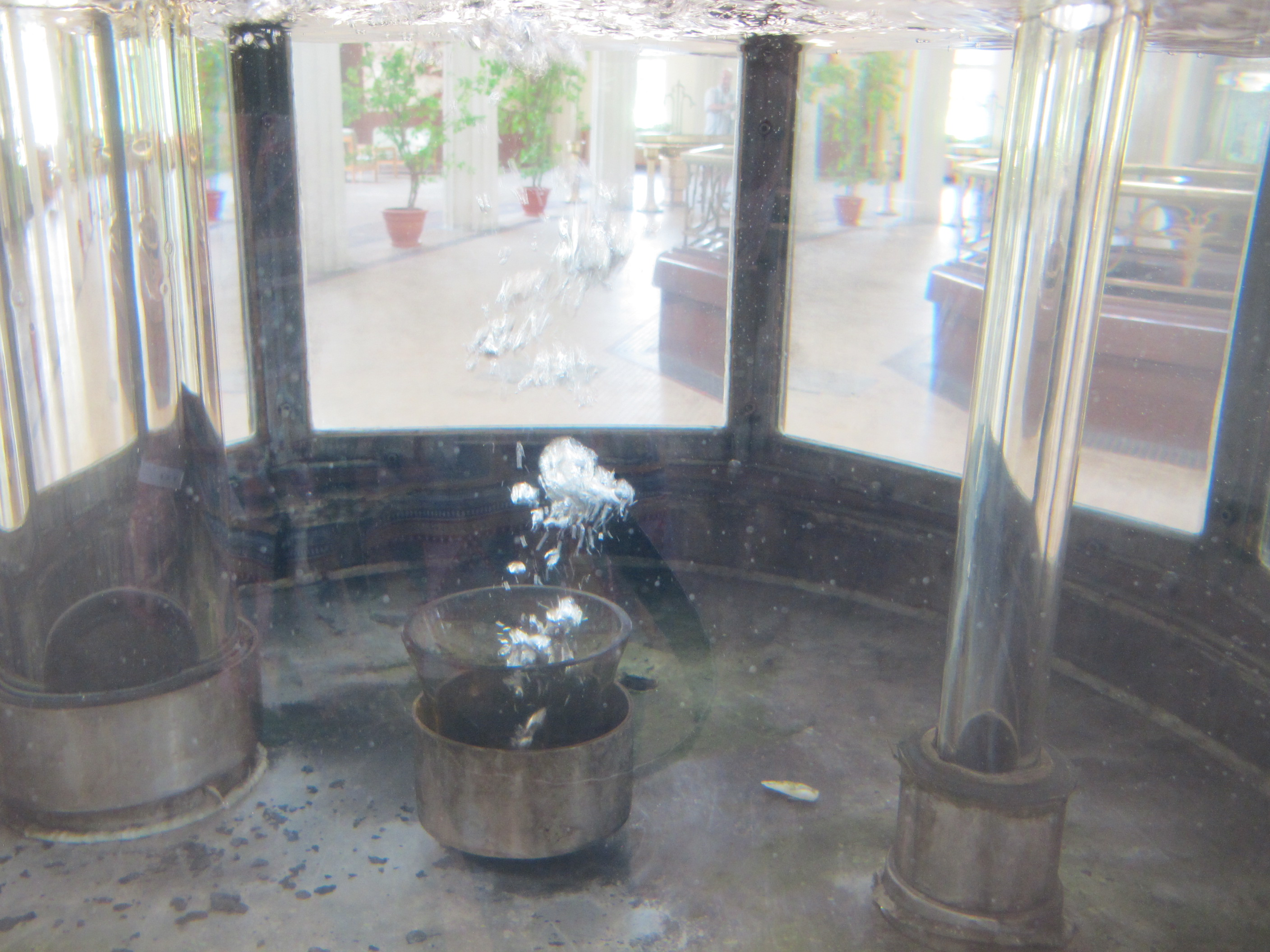 Quelle Novy Kostelni